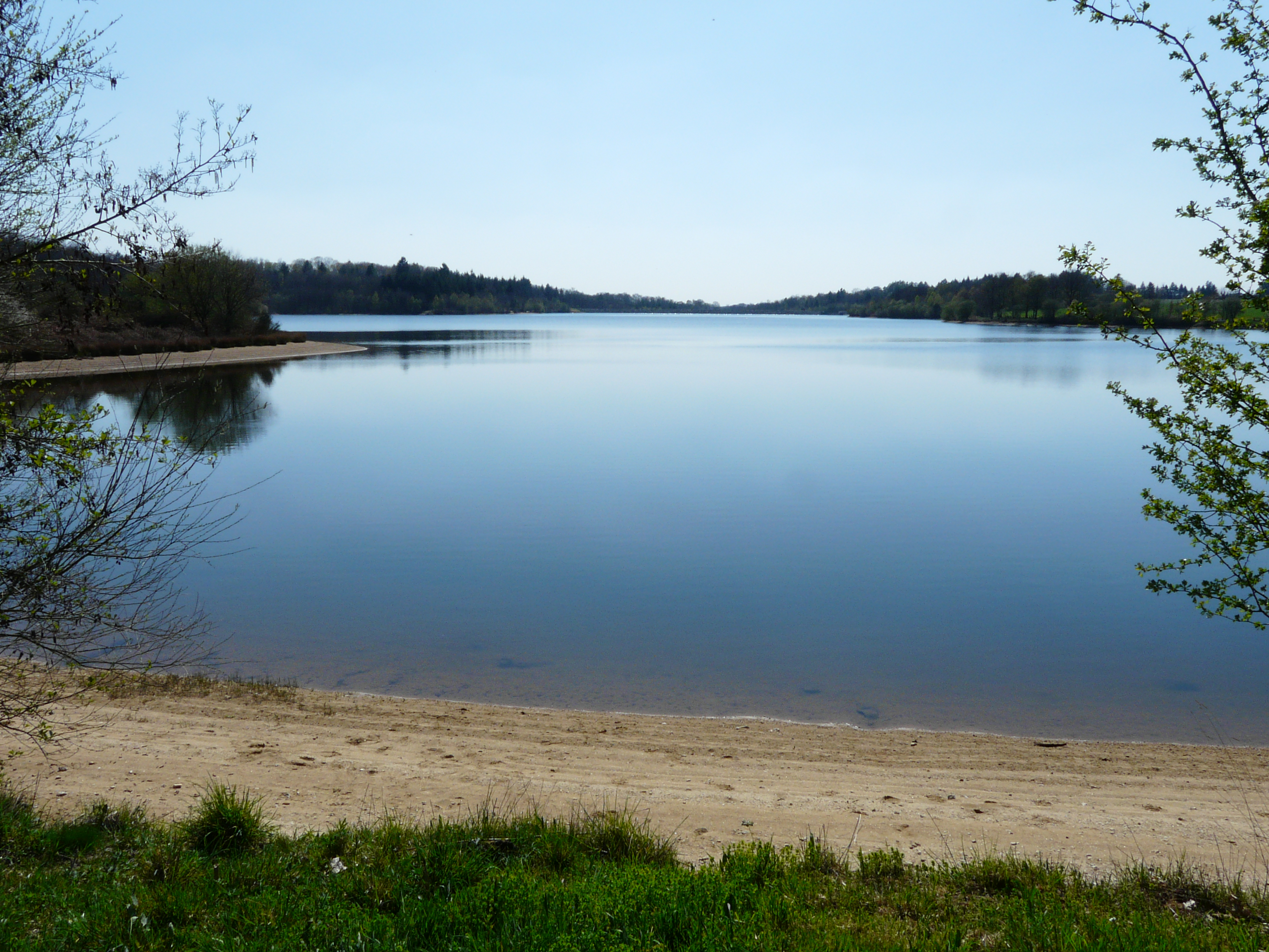 Le plan d'eau de Miallet vu depuis la rive nord-est, Mialet, Dordogne, France.